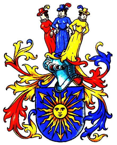 Wappen derer von Schmeling (jüngere Form, seit 1903 wird es jedoch wieder in der alten Form geführt).